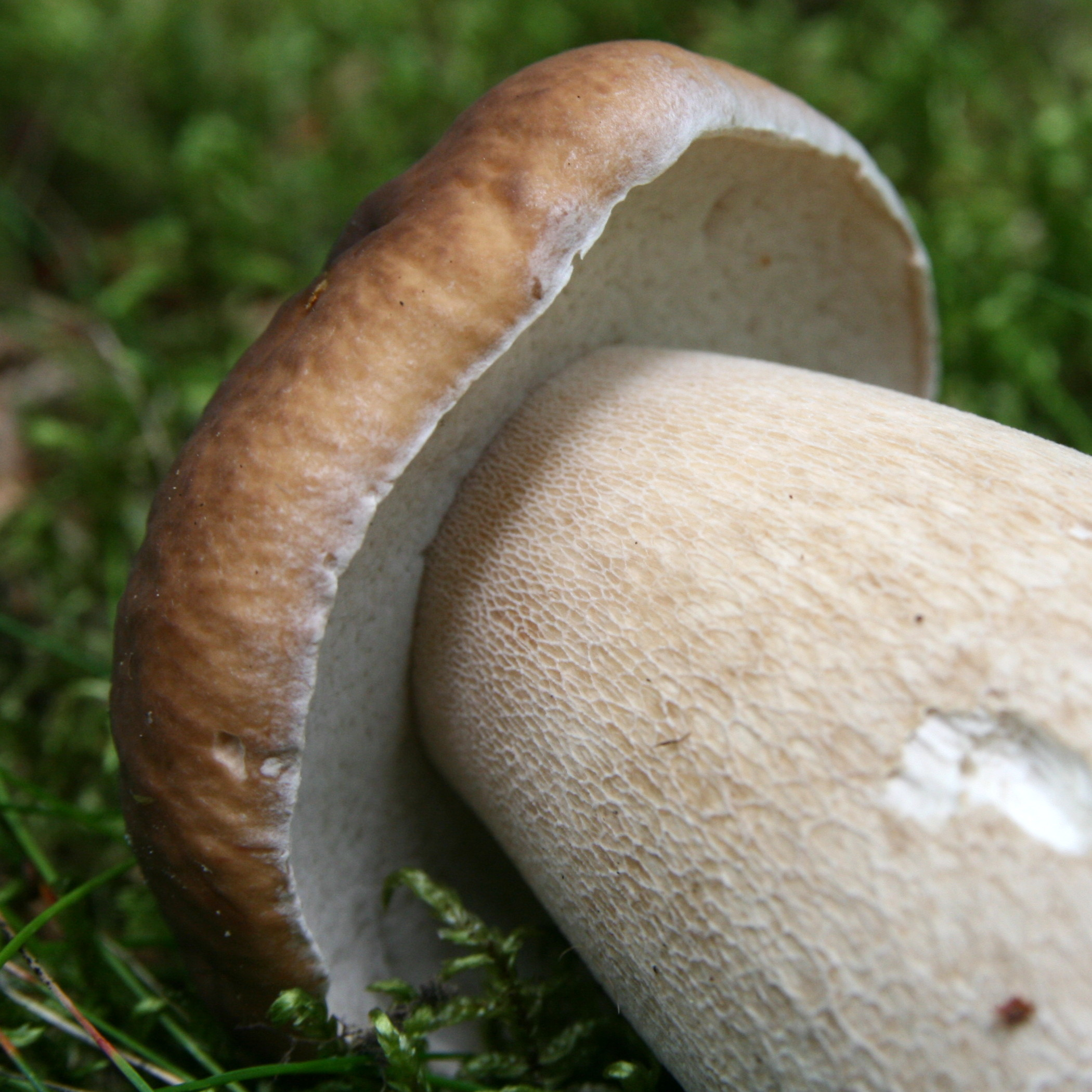 Herkkutatti, Boletus edulis